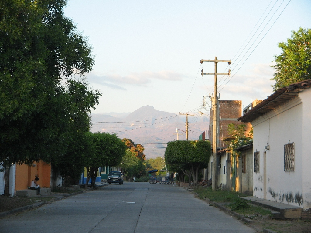 Calle de Zanatepec, en el estado de Oaxaca